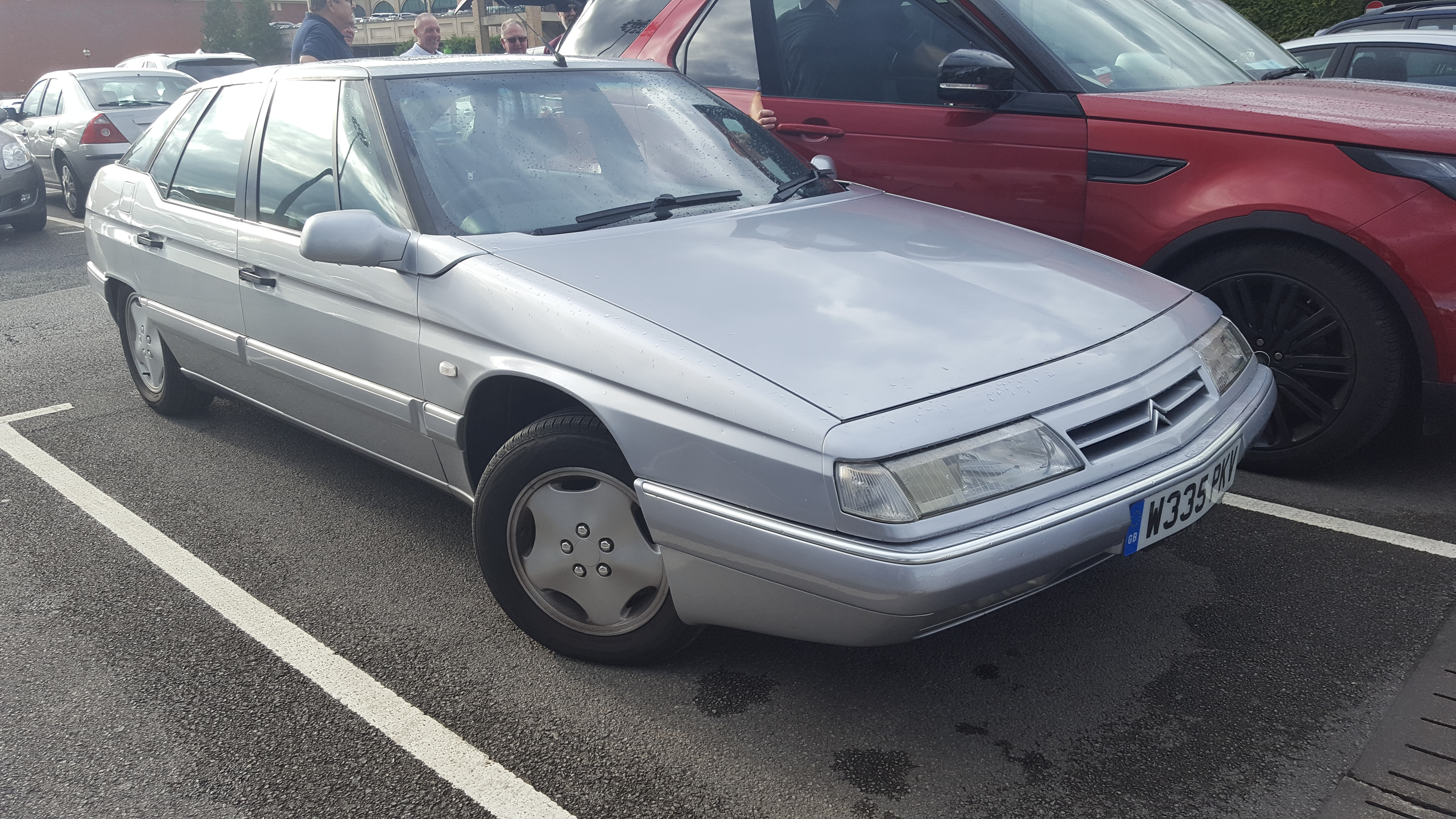 2000 Citroen XM 2.1 TD VSX Auto